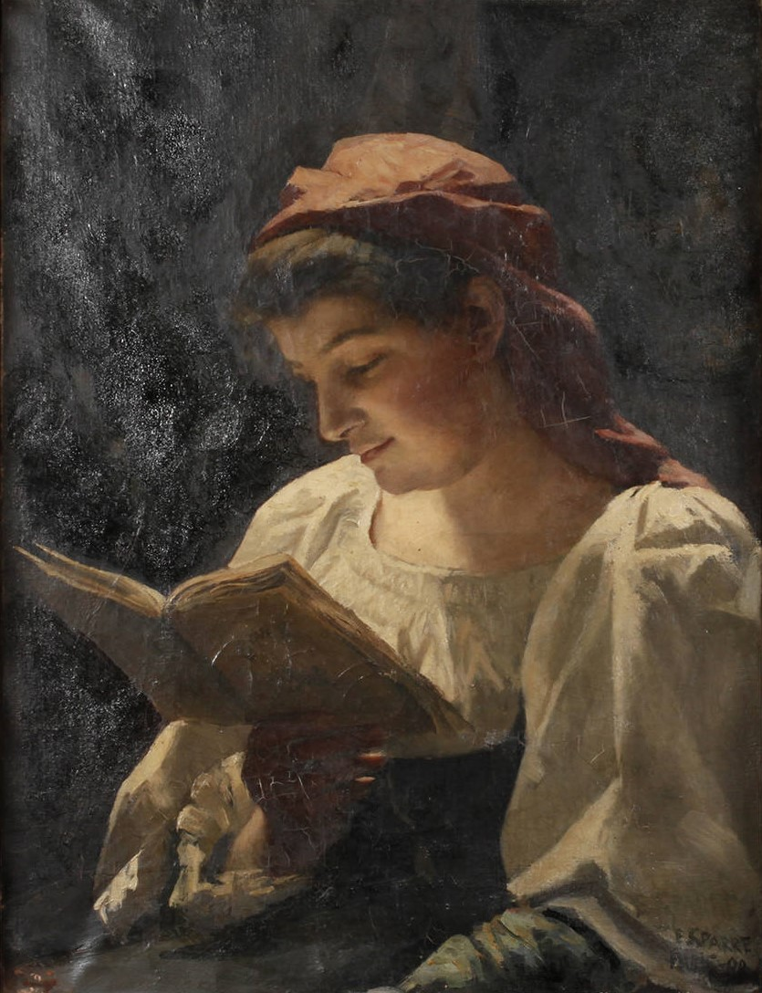 Baronin Emma Sparre: Lesendes Mädchen (möglicherweise Portrait der Tochter der Künstlerin, der späteren Malerin und Plastikerin Märta Améen (geborene Sparre, 1871 Wien - 1940 Ost Vingakers in Södermanland)